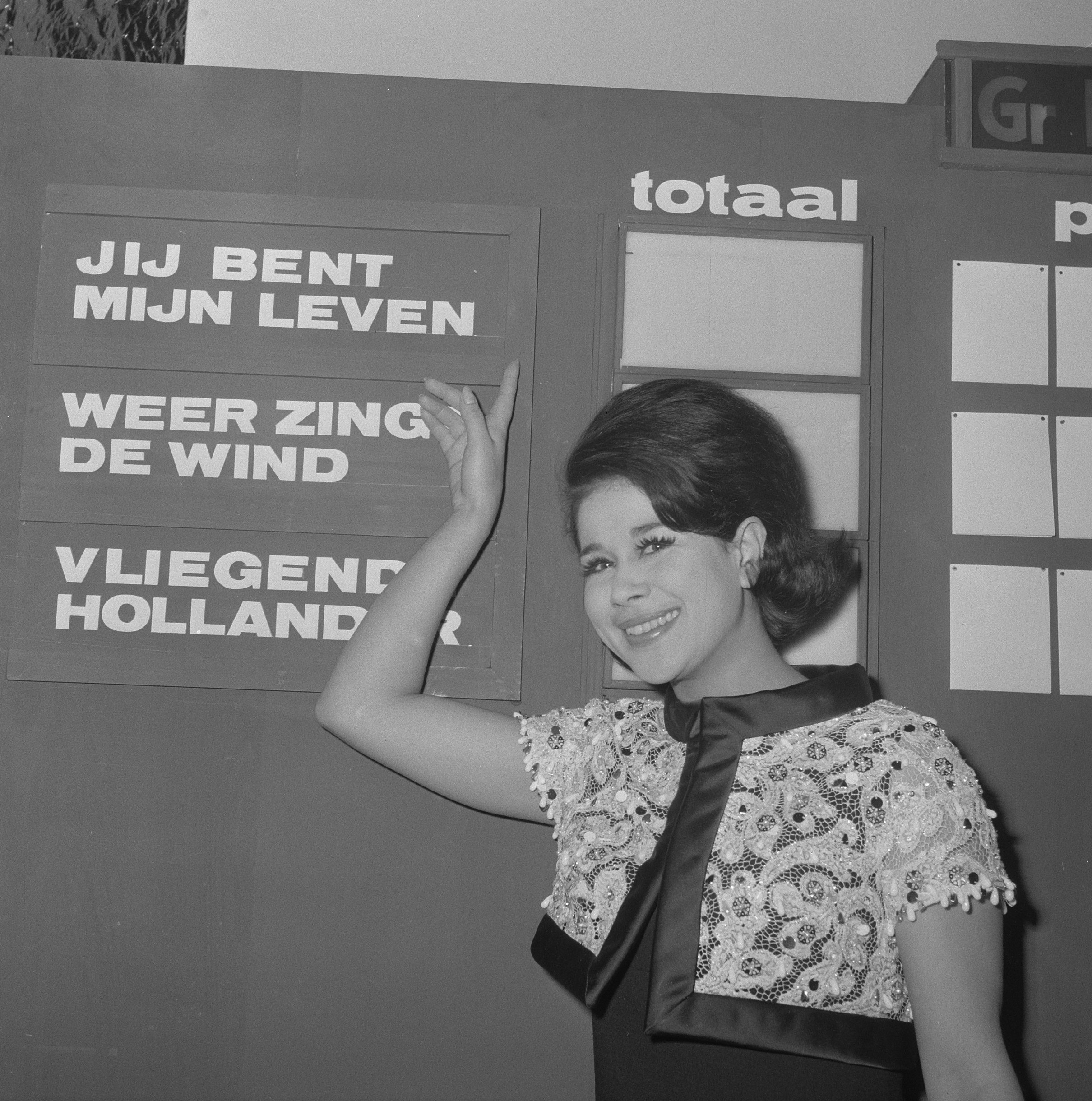 Collectie / Archief : Fotocollectie Anefo Reportage / Serie : [ onbekend ] Beschrijving : Nationaal Songfestival 1964. Anneke Grönloh bij het scorebord met de titels van de uit te kiezen liedjes Datum : 21 februari 1964 Trefwoorden : artiesten, muziek, songfestivals, zangeressen Persoonsnaam : Grönloh, Anneke Fotograaf : Nijs, Jac. de / Anefo Auteursrechthebbende : Nationaal Archief Materiaalsoort : Negatief (zwart/wit) Nummer archiefinventaris : bekijk toegang 2.24.01.03 Bestanddeelnummer : 916-0854